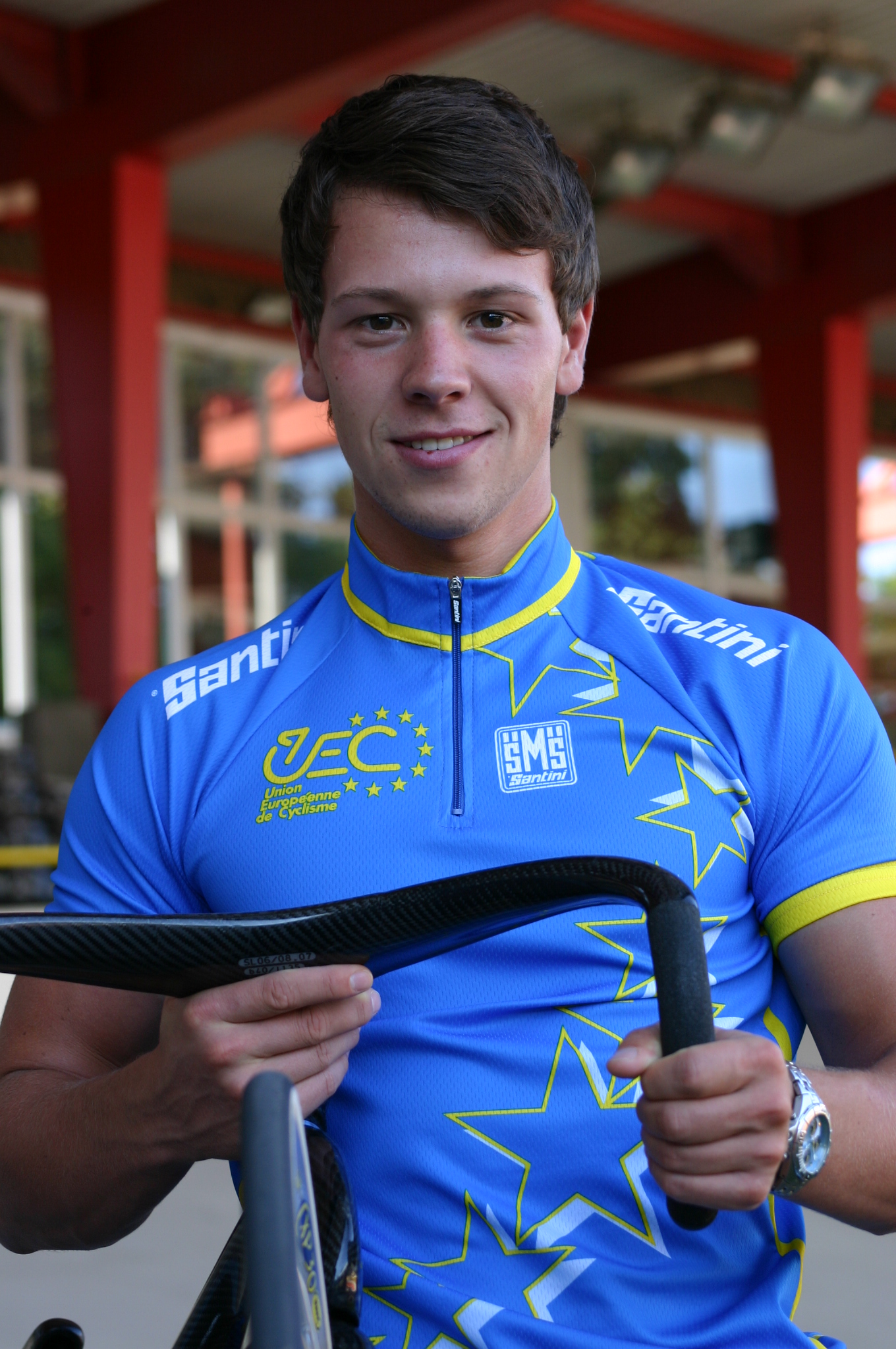 Eric Engler, deutscher Bahnradsportler